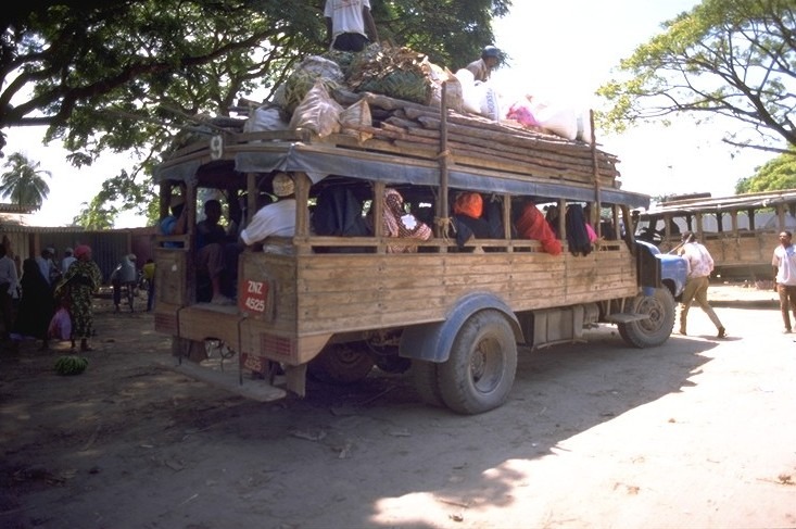 Dala dala Zanzibar, 1996 Photo by User:Esculapio